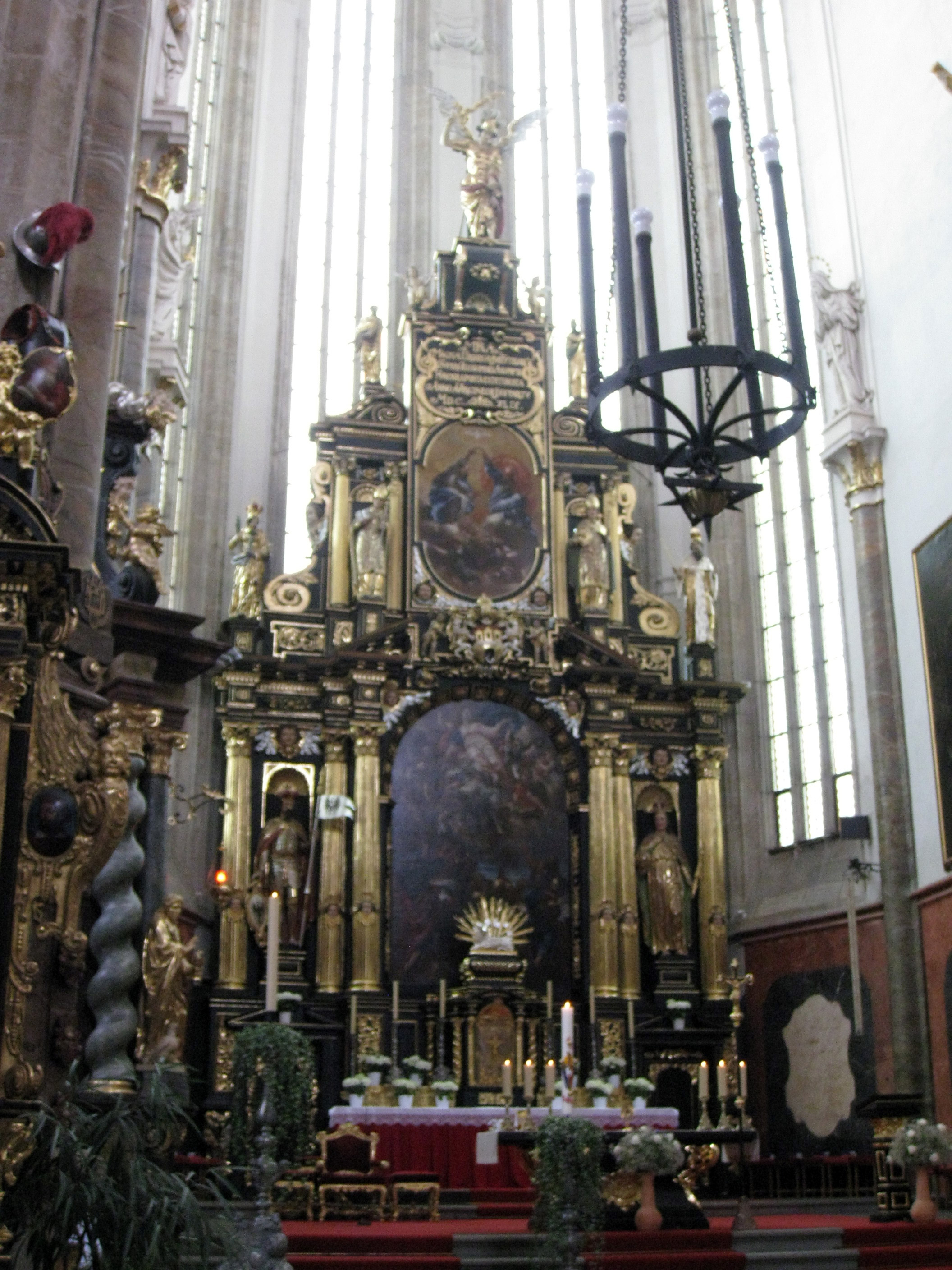 Praha 1-Staré Město, Týnský chrám.